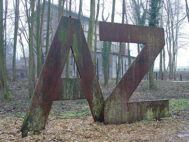 Mahnmal von Volker-Johannes Trieb am Augustaschacht Ohrbeck. Das AZ steht für "Arbeitszucht". Im Hintergrund das Pumpenhaus des Augustaschachtes